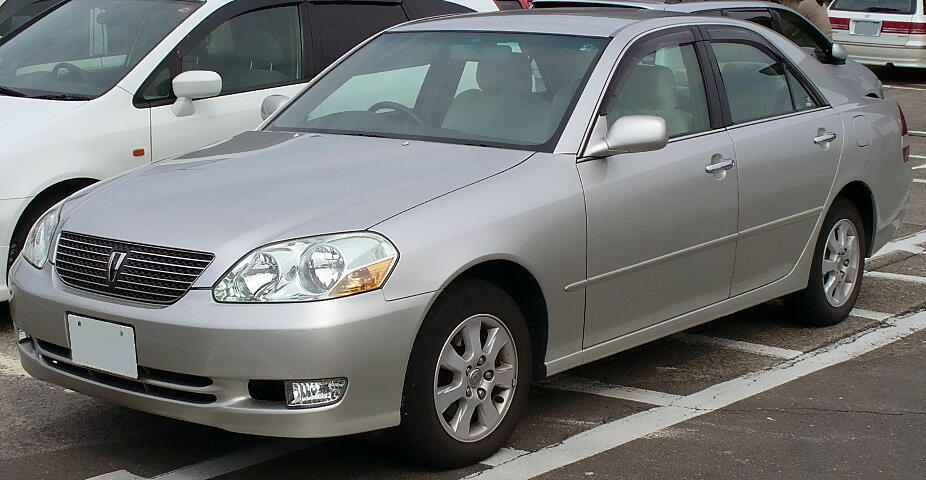 トヨタ・マークII（X110系）